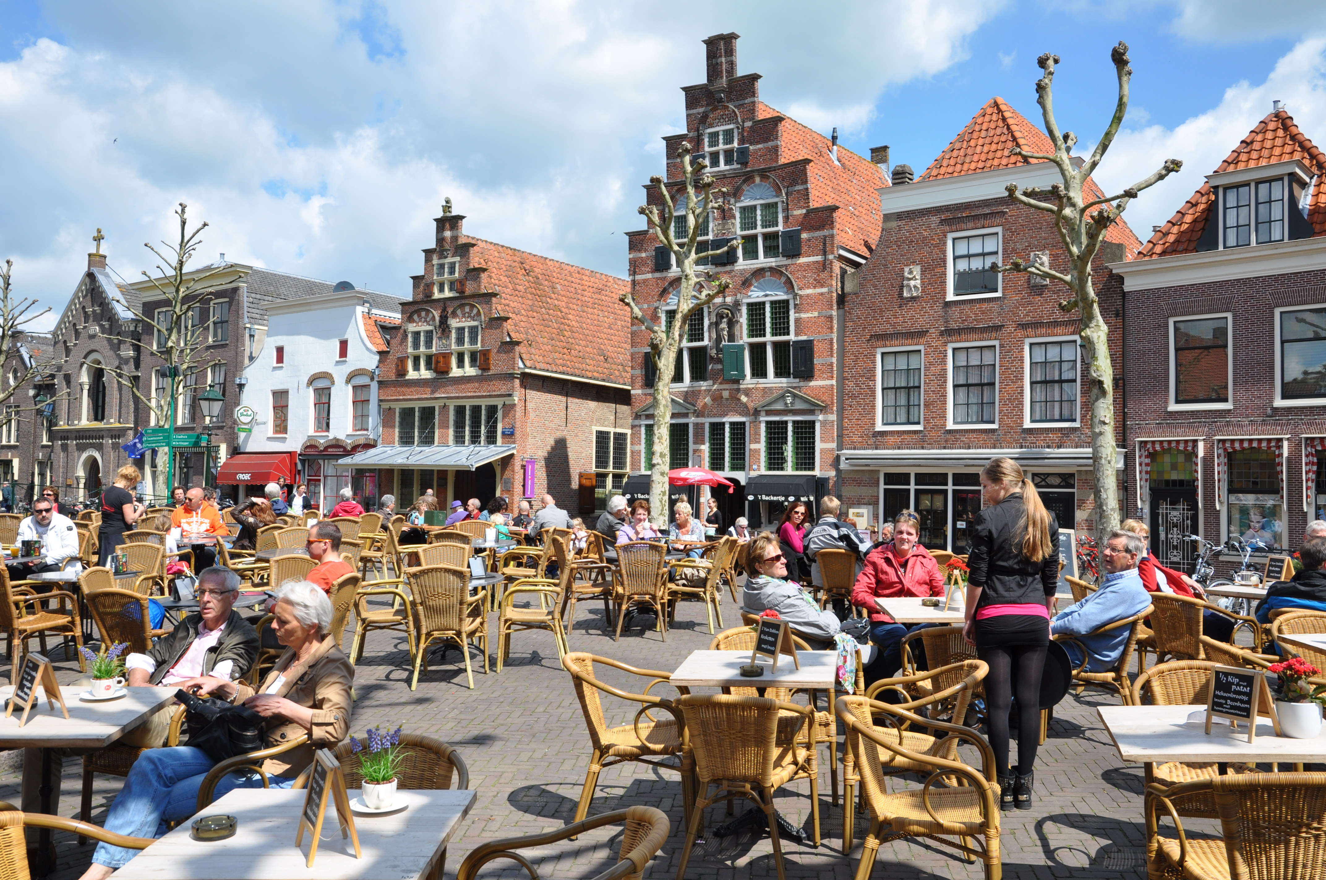 Oudewater.